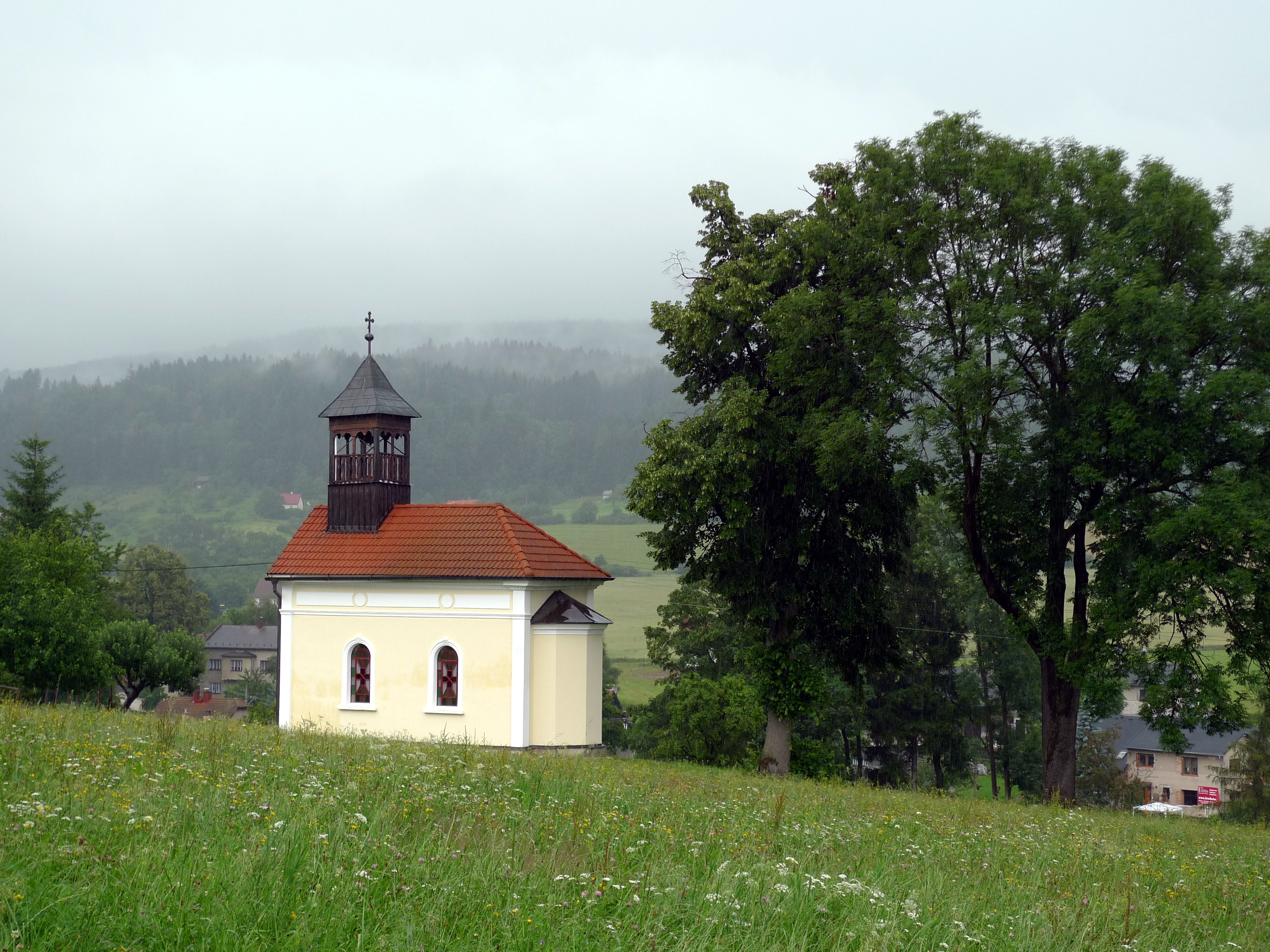 Kaple ve Velkých Svatoňovicích